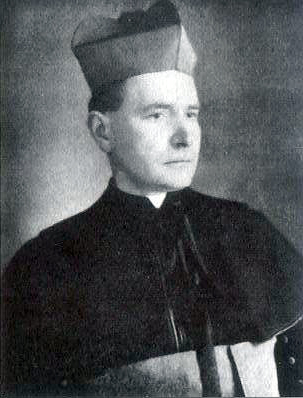 Josef Vašica (1884 - 1968), Český teolog, filolog, slavista, biblista, literární historik, editor, publicista, překladatel, katolický kněz a vysokoškolský pedagog.